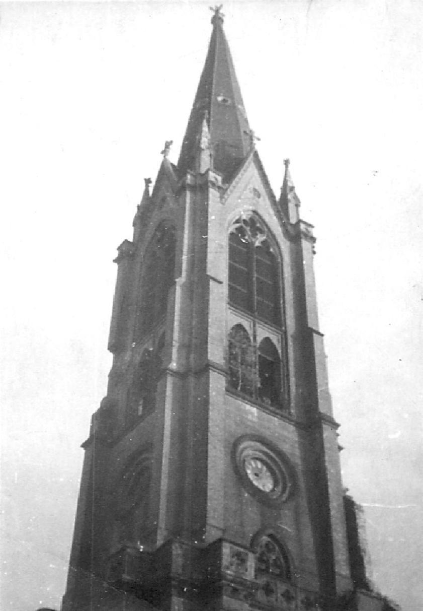 Nysa - wieża kościoła ewangelickiego p.w. św. Katarzyny, 1885-1888